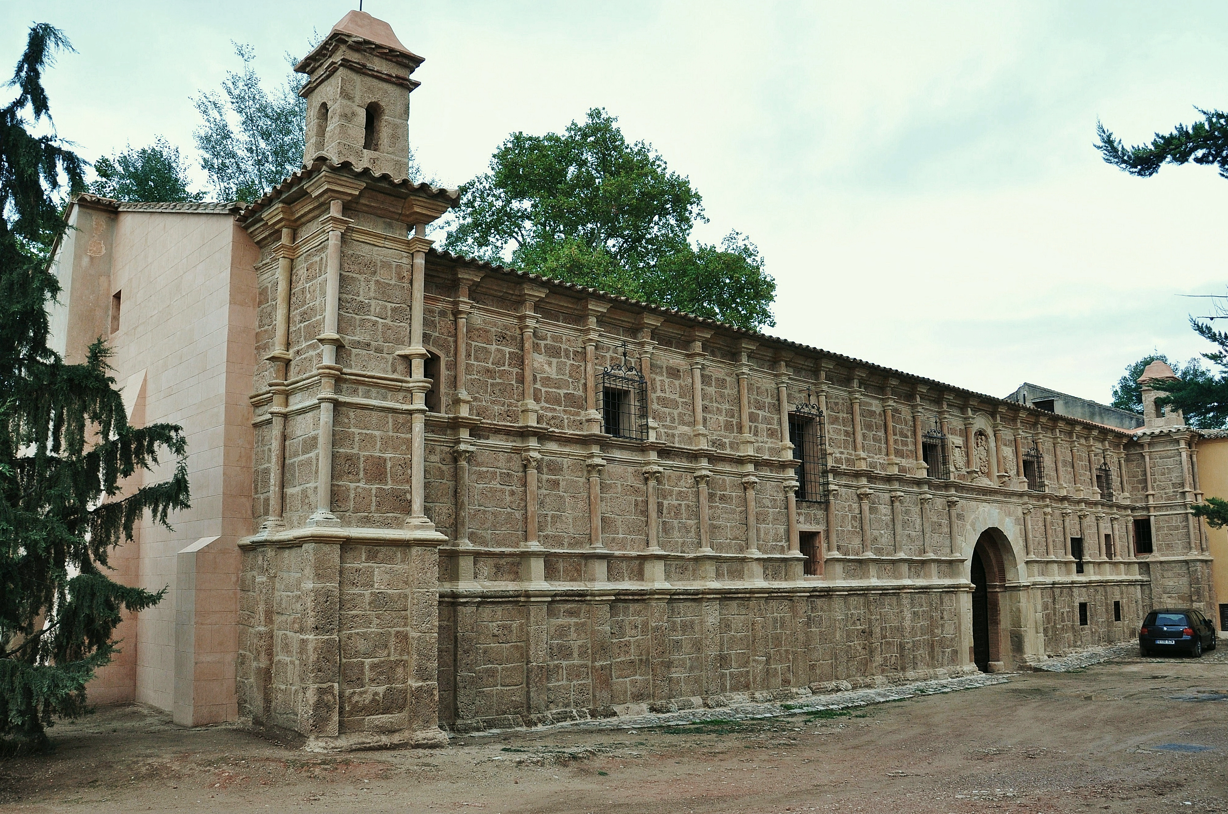 aragon-españa